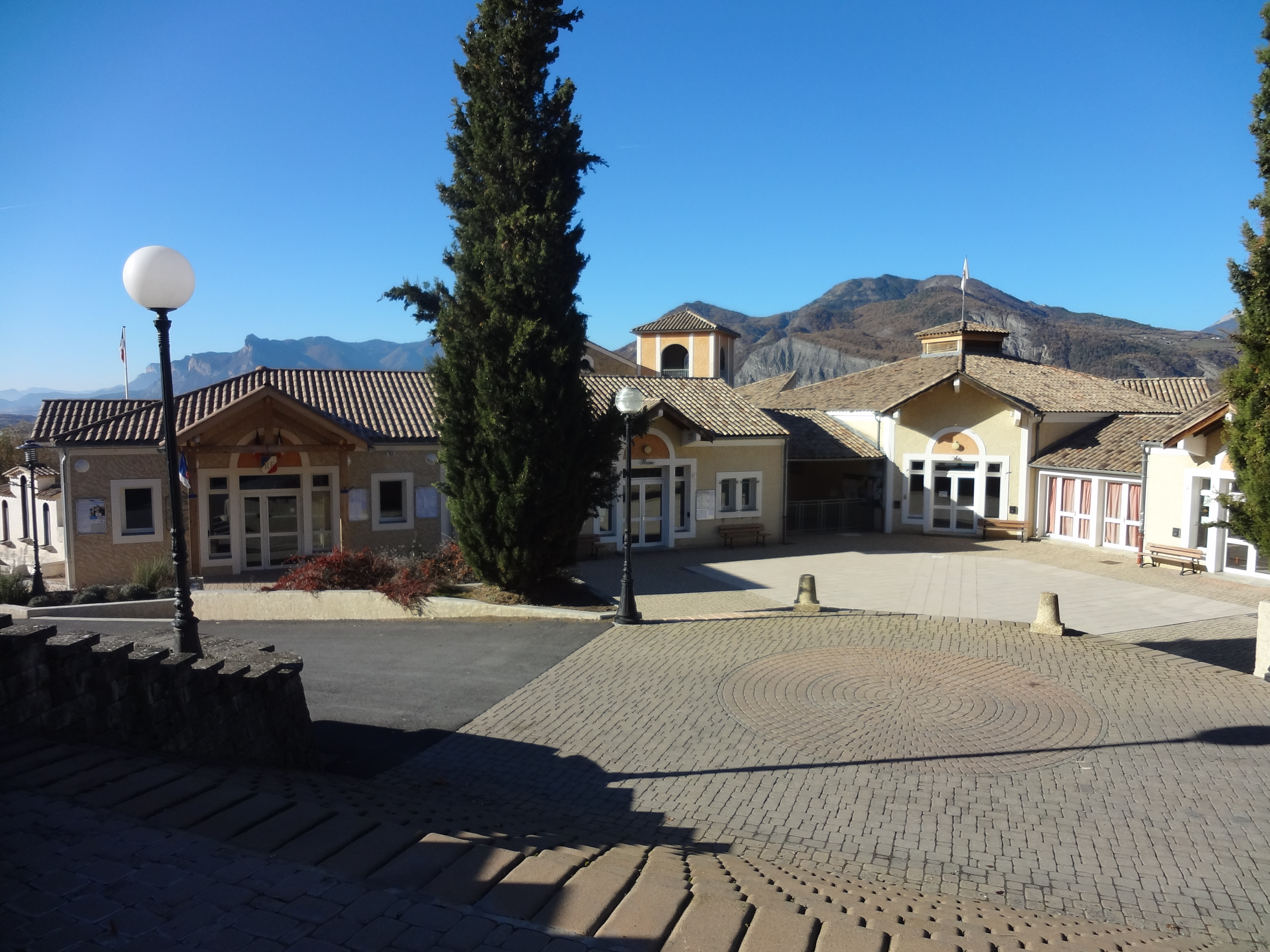 Bâtiment construit en 2013 : mairie à gauche, salles communes ensuite.